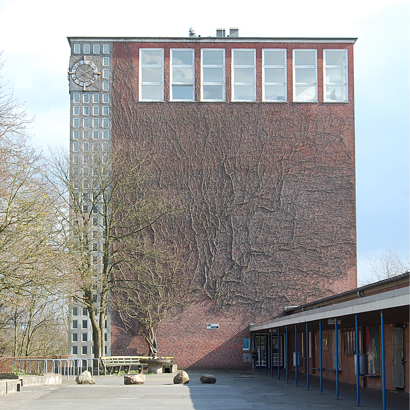 Max-Planck-Schule Kiel, Frontansicht mit "Oberem Schulhof"